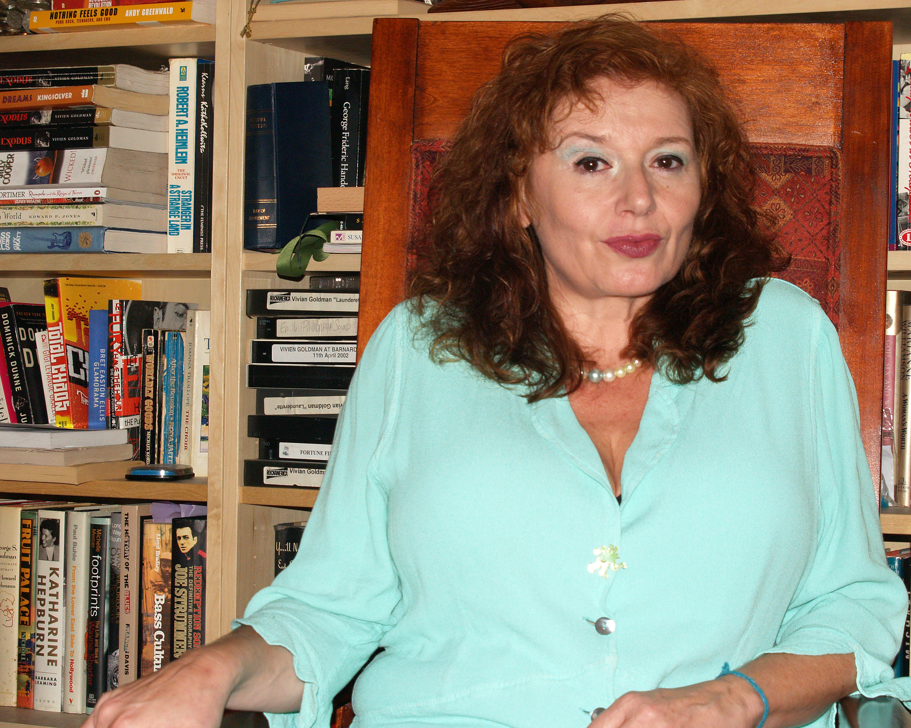 Vivien Goldman by David Shankbone